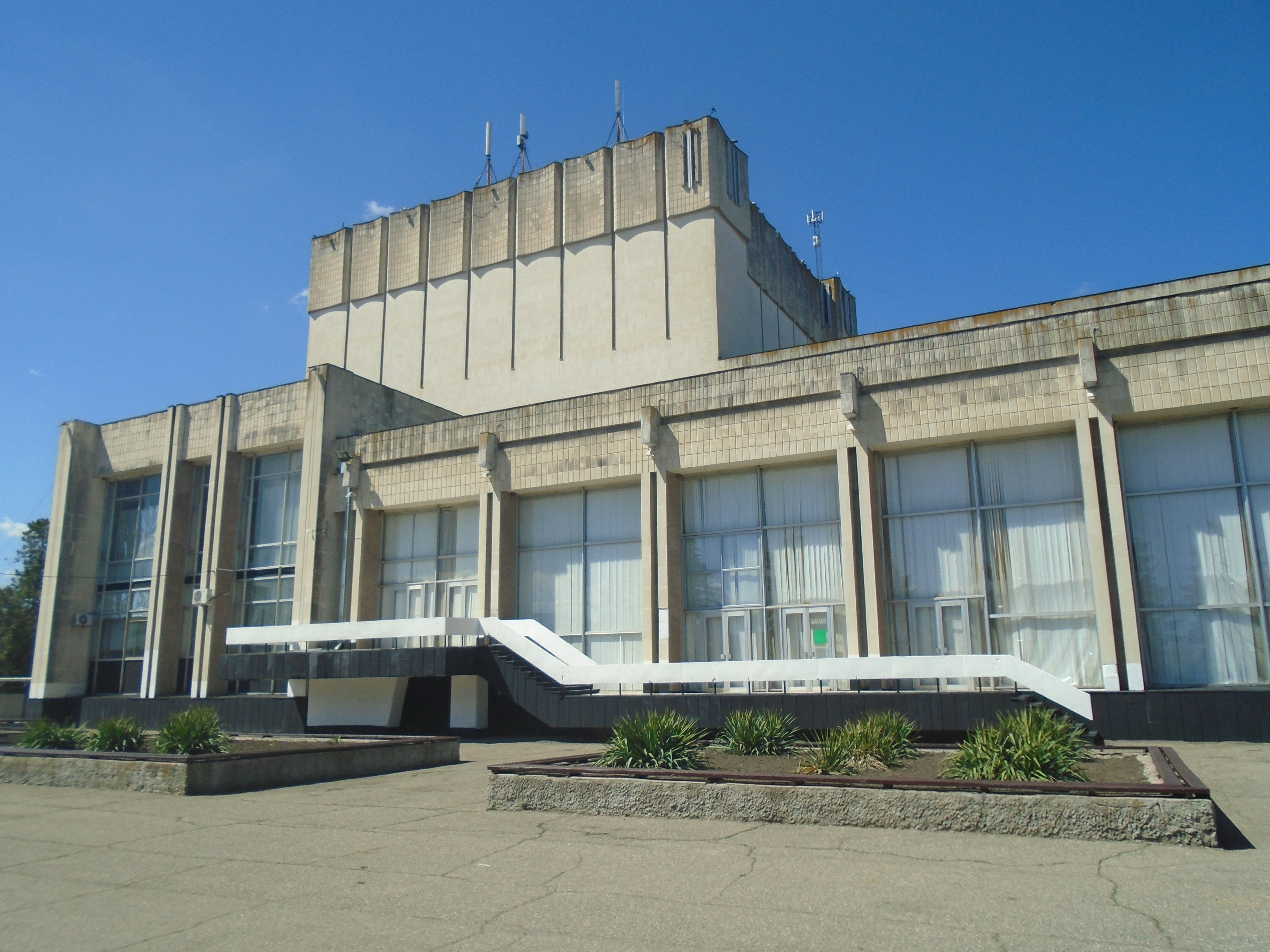 Дворец культуры